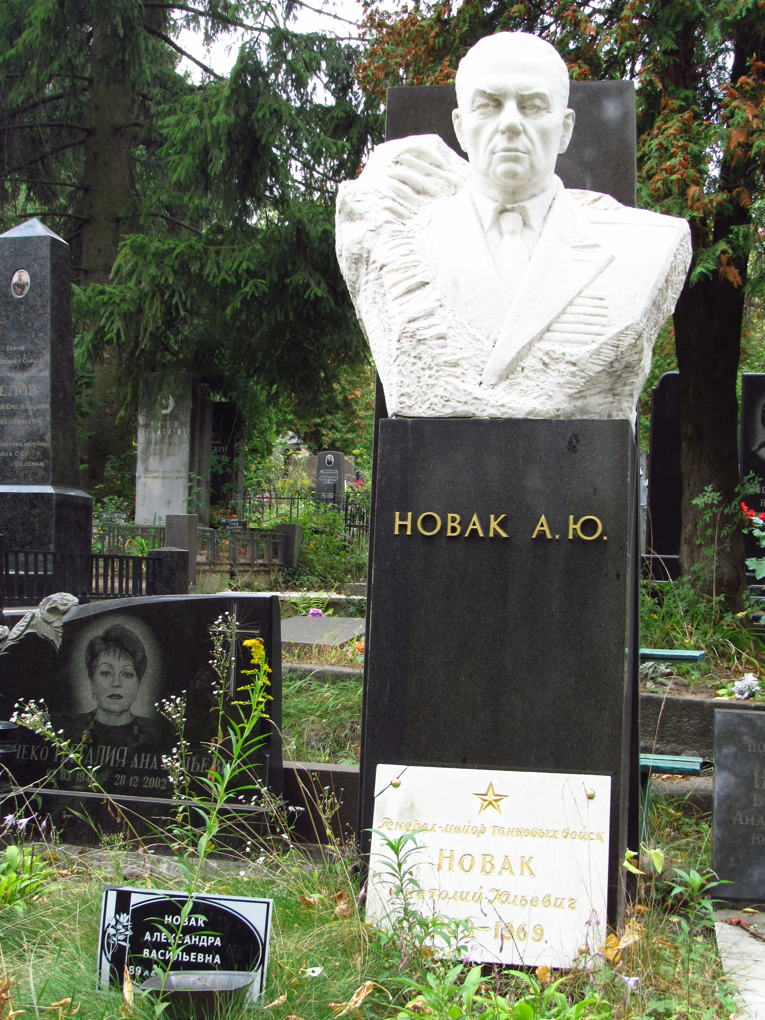 Могила Новака А. Ю., учасника антифашистської боротьби в Іспанії, Київ, Байкова вул., 6, діл. 46